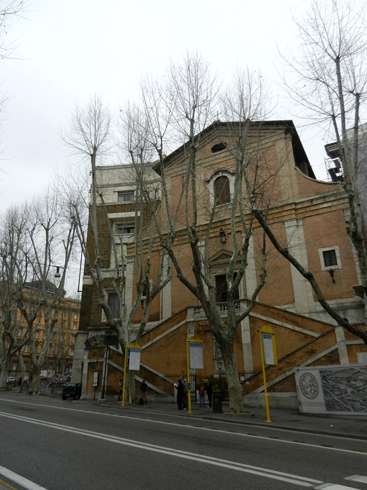 Roma - Chiesa di S. Maria della Concezione (Chiesa dei Cappuccini)